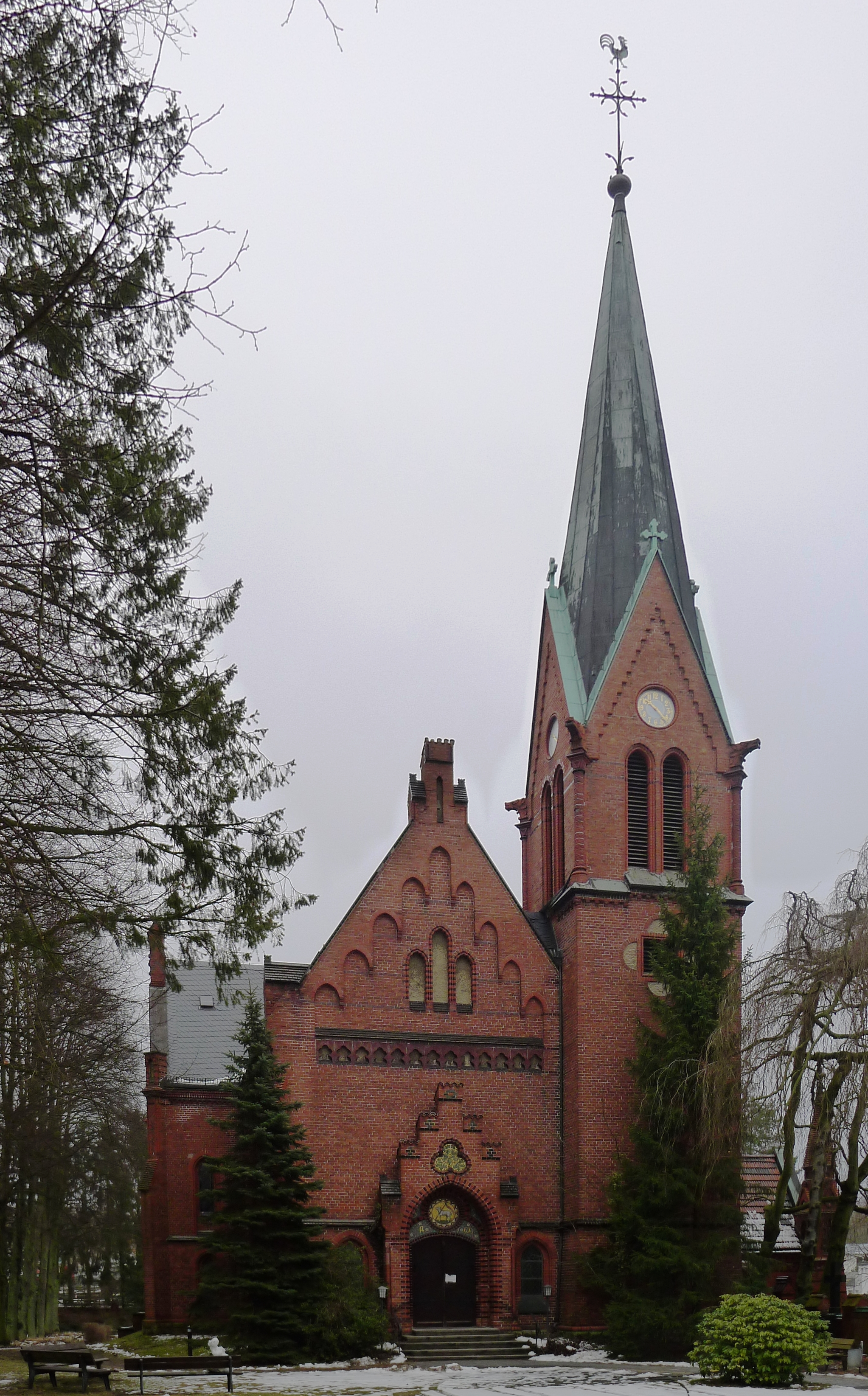 Blick auf die Portalseite der Kirche mit dem Glockenturm